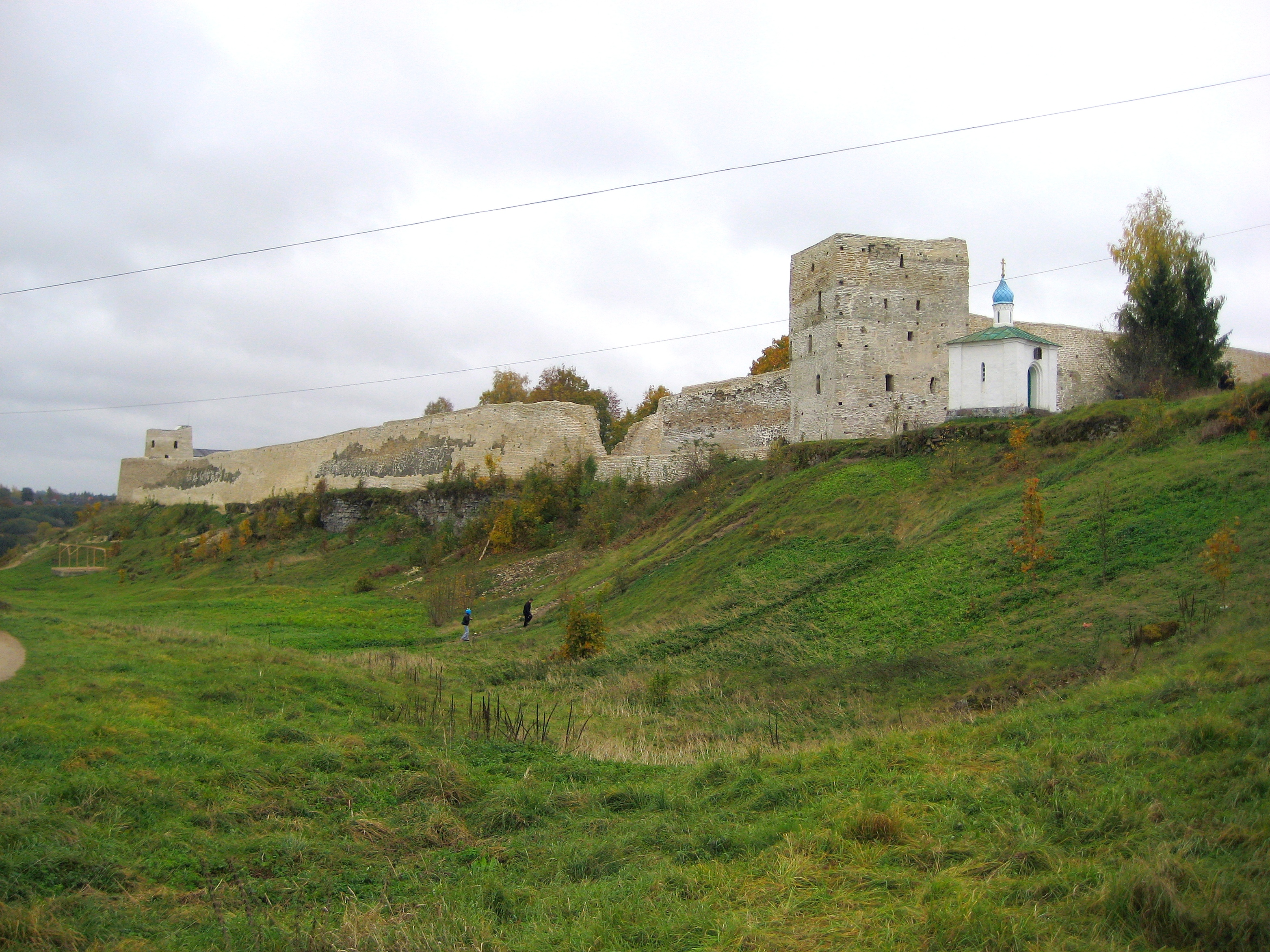 крепость Изборск (ансамбль Староизборской крепости и Труворова городища) (Псковская область, Печоры, село Старый Изборск, крепость)